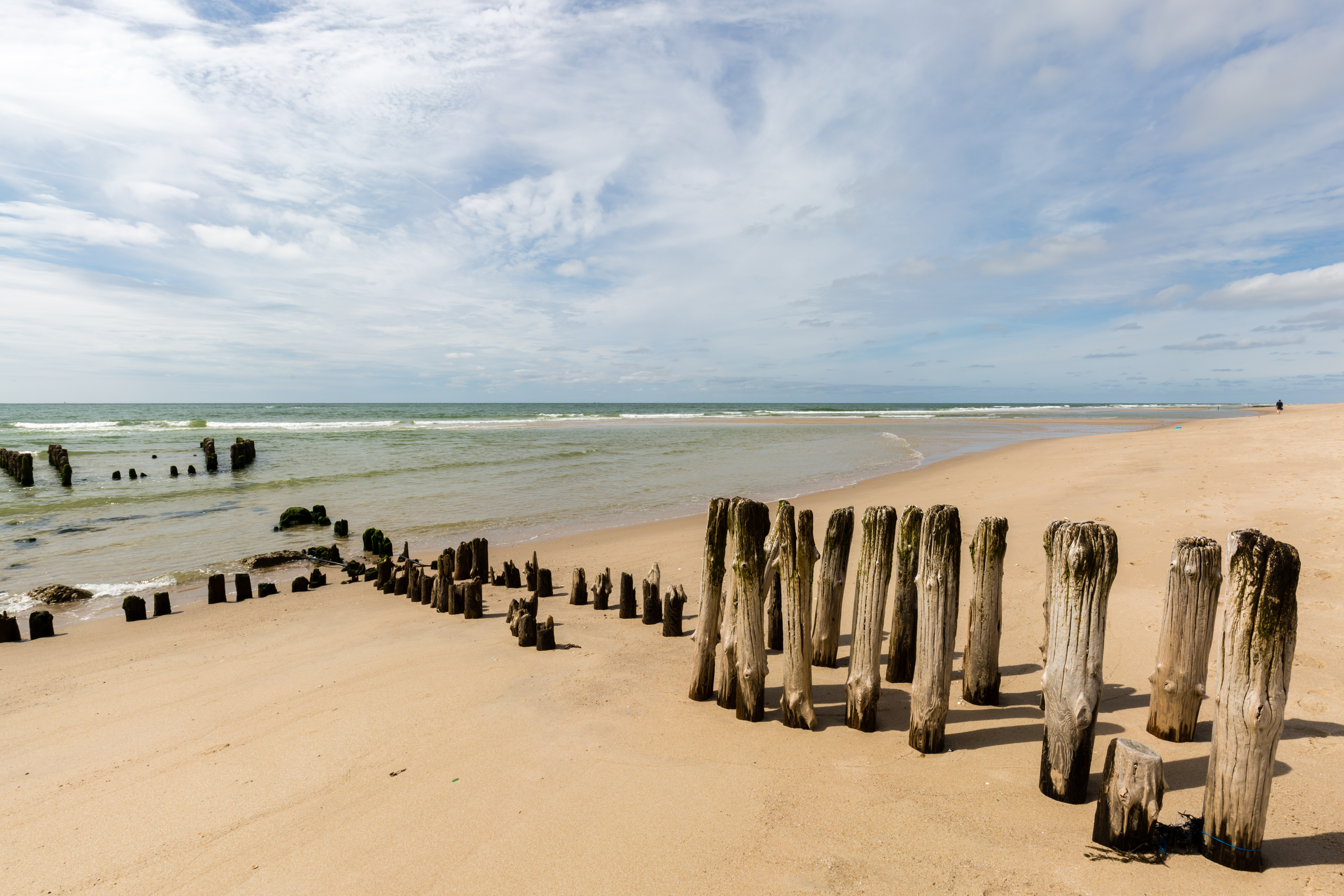 Holz-Buhnen am Strand von Rantum/Sylt